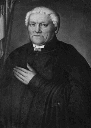 František Matějovič Vetešník (1784 - 1850), Český římskokatolický kněz a básník, spisovatel a překladatel.